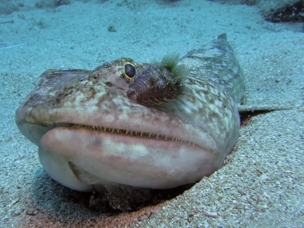 Nerocila armata - Isopods / Piojo de mar / Isopode & Synodus synodus - Diamond lizardfish / Lagarto / Poisson lézard, Tenerife.